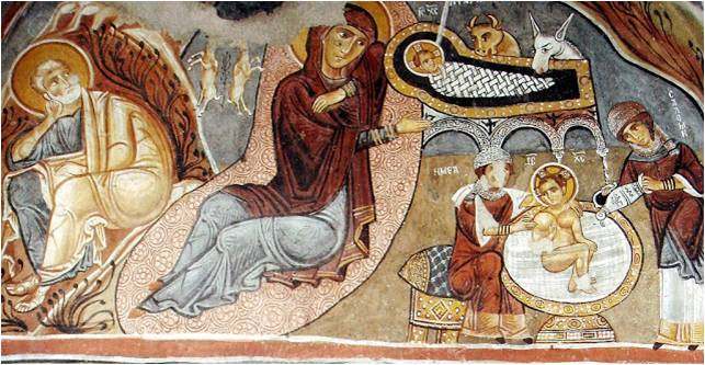 Llit